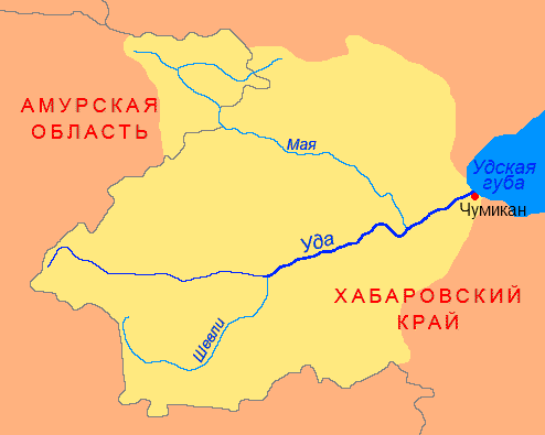 Схема бассейна реки Уда